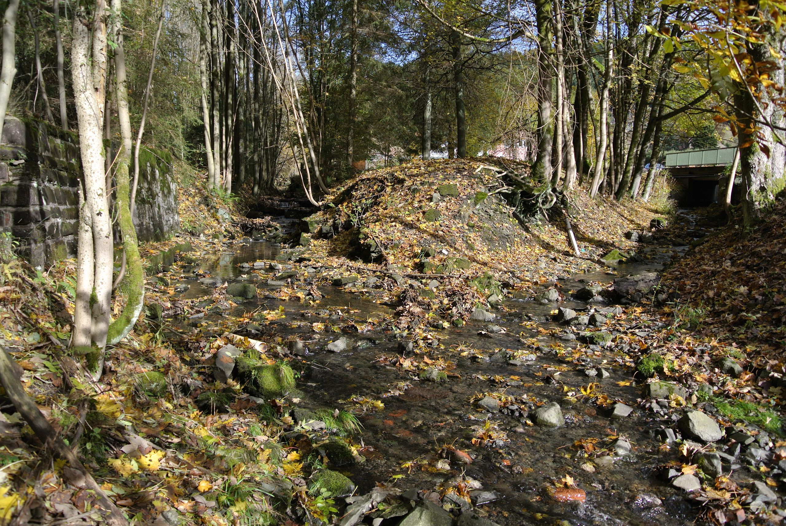 Einmündung des Wäschegrunds (rechts) in die Sperrlutter (links) in Silberhütte